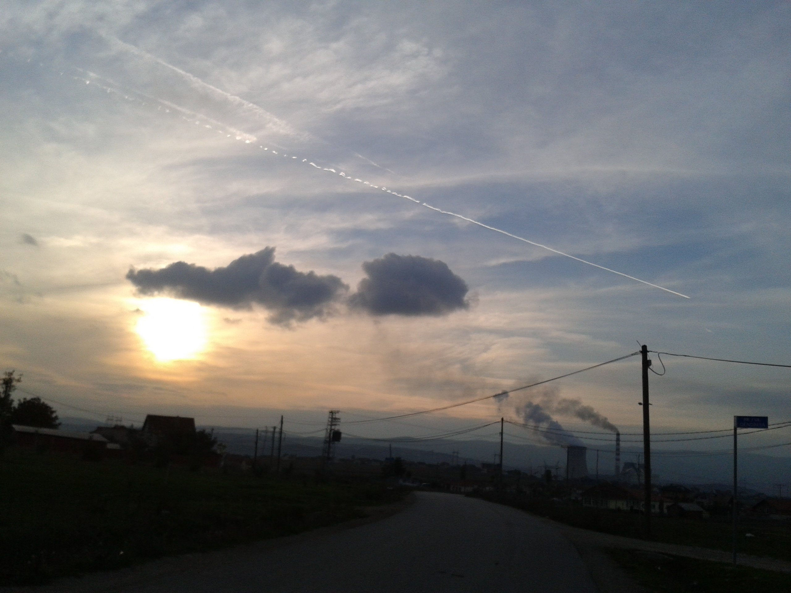 Termocentrali